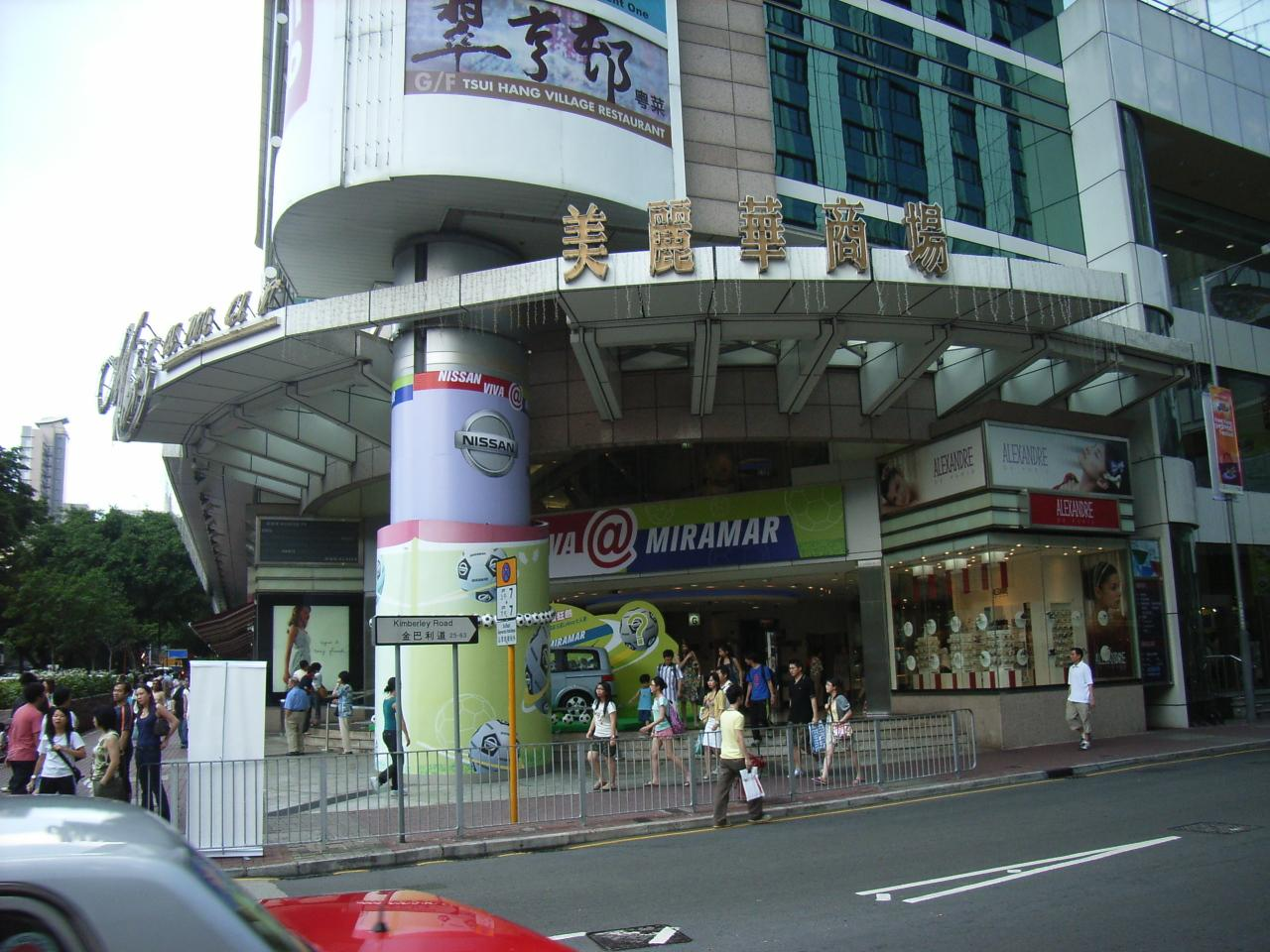 Tsim Sha Tsui, Kowloon, Hong Kong Photo by TonySKTO